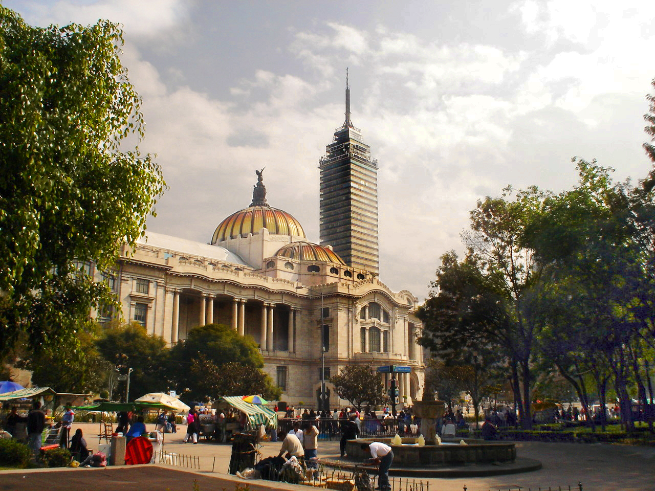 Vista panoramica desde la Alameda Central VISTA PANORAMICA DE LA ALAMEDA (photo date: 9/12/2006)